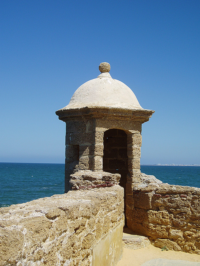 Garita en el Castillo de Sta. Catalina de Cádiz, España. Se pueden apreciar las características (color, textura) de la piedra ostionera con la que se ha construido. La piedra ostionera es una roca sedimentaria usada en las fortificaciones y otros edificios de la capital gaditana y en las ciudades de su entorno: El Puerto de Santa María, San Fernando, Puerto Real...